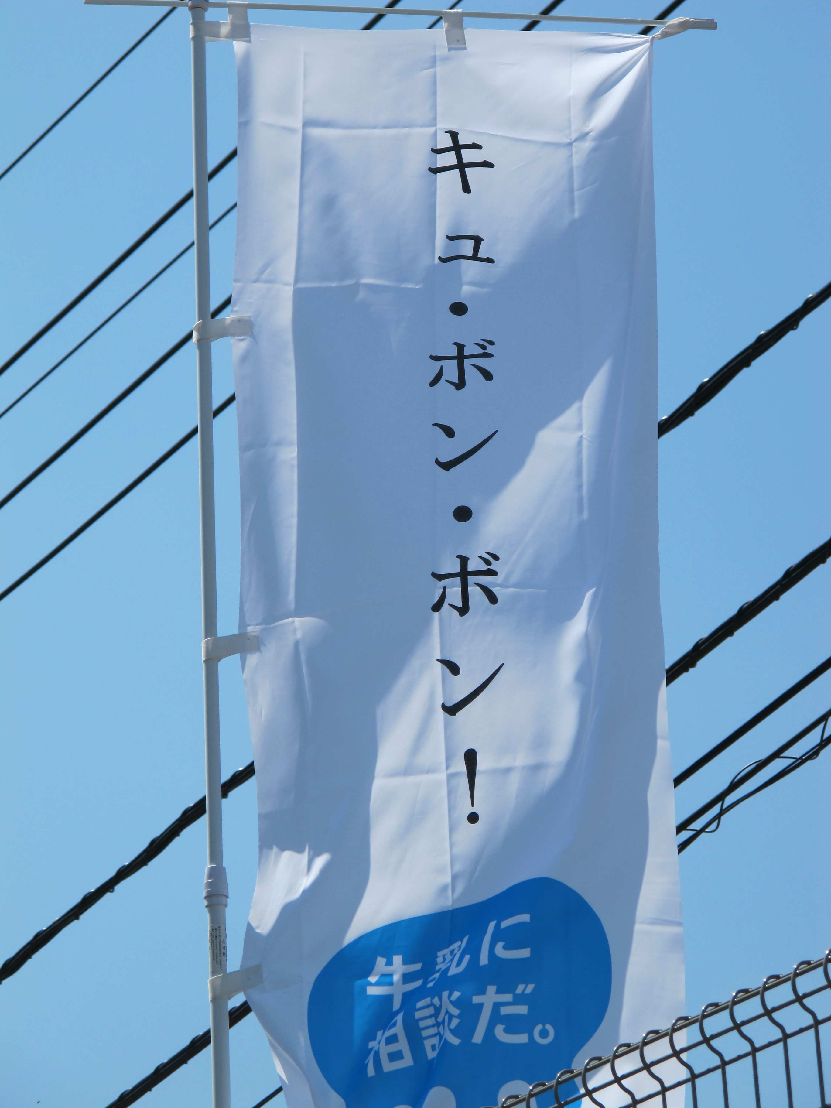 キュ・ボン・ボン 牛乳に相談だ。